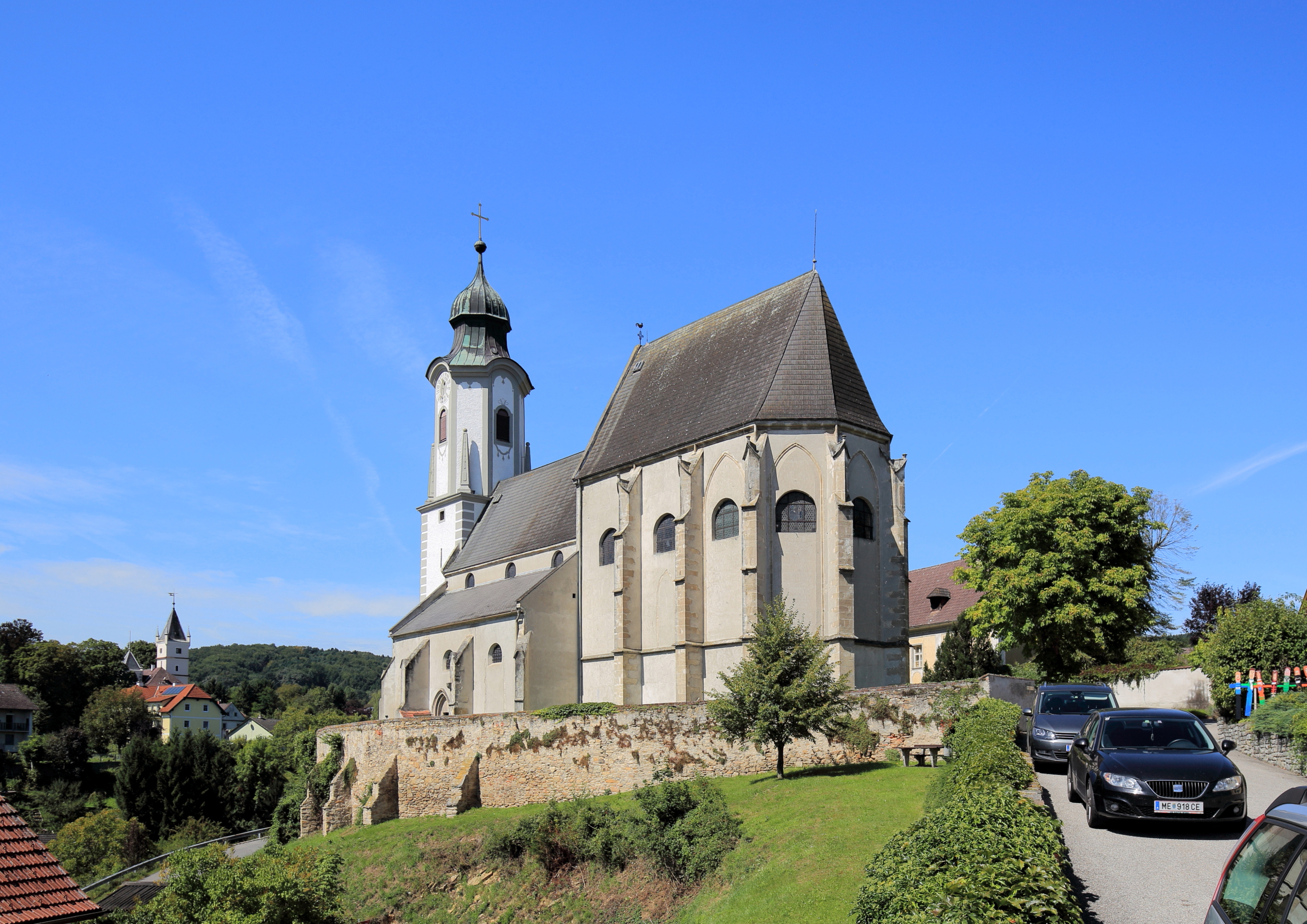 Die katholische Pfarrkirche hl. Nikolaus in der niederösterreichischen Marktgemeinde Emmersdorf an der Donau. Eine spätgotische Pfeilerbasilika, die im Süden von einer spätmittelalterlichen Futtermauer mit wuchtigen Strebepfeilern umgeben ist. Der Langchor wurde im 4. Viertel des 15. Jahrhunderts errichtet. Das wuchtige Untergeschoß des vorgestellten Westturm stammt ebenfalls aus dem 15. Jahrhundert. 1738 wurde dem ein barocker oktogonaler Aufsatz mit 4 Eckobelisken aufgesetzt.